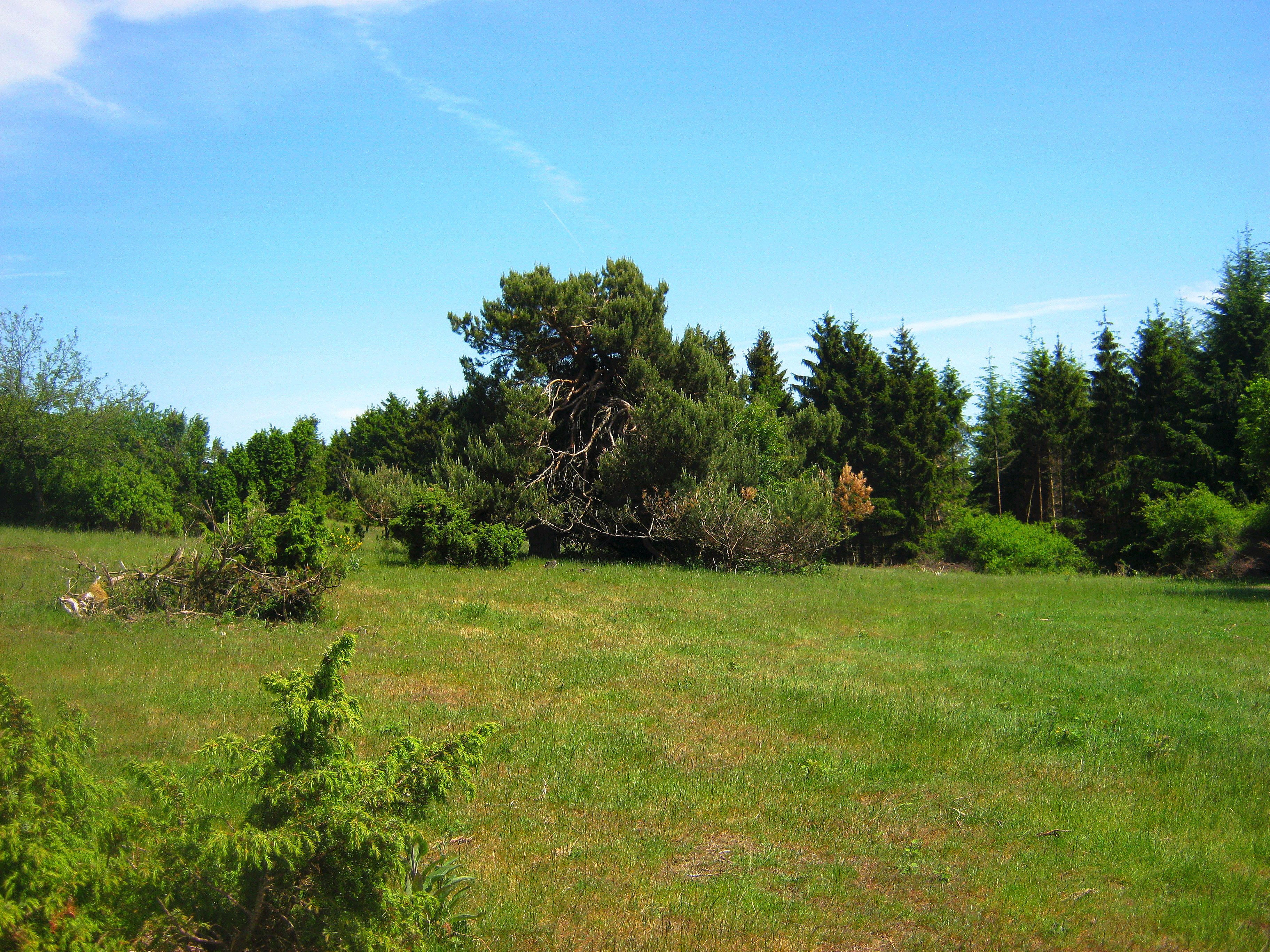 Wachholdergebiet Heidbüchel bei Arft (Teilfläche des Naturschutzgebiets „Wacholderheiden Raßberg und Heidbüchel“), Bereich am „Traumpfad Bergheideweg“